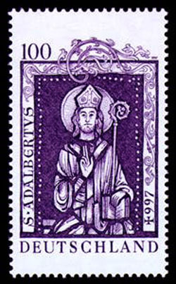 1000. Todestag Heiliger Adalbert, Detail vom Kirchenportal in Gnesen